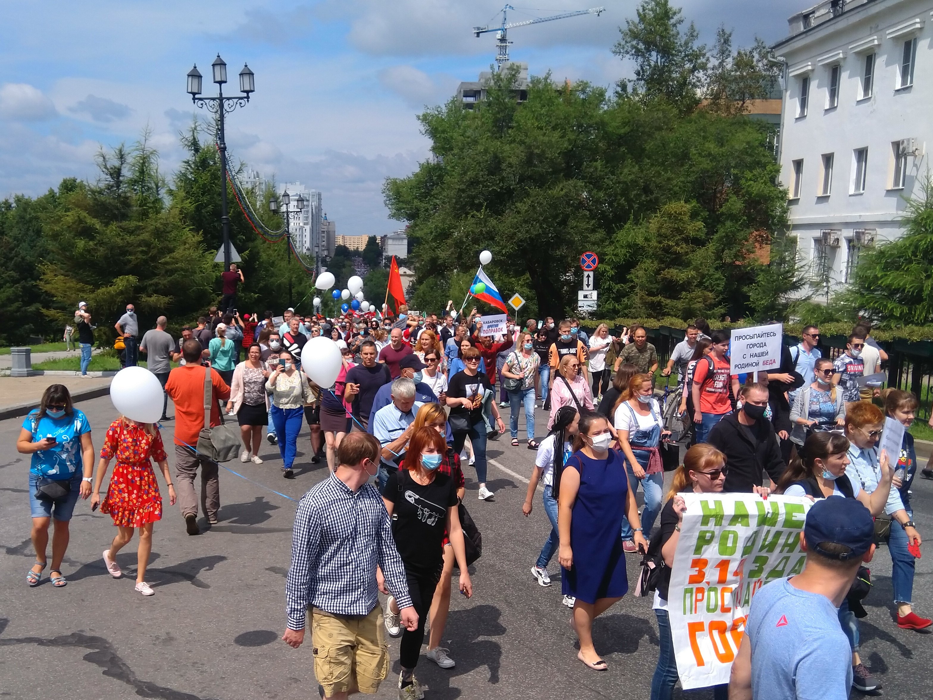 Митинг в Хабаровске 8 августа 2020. Подъём на площадь Славы